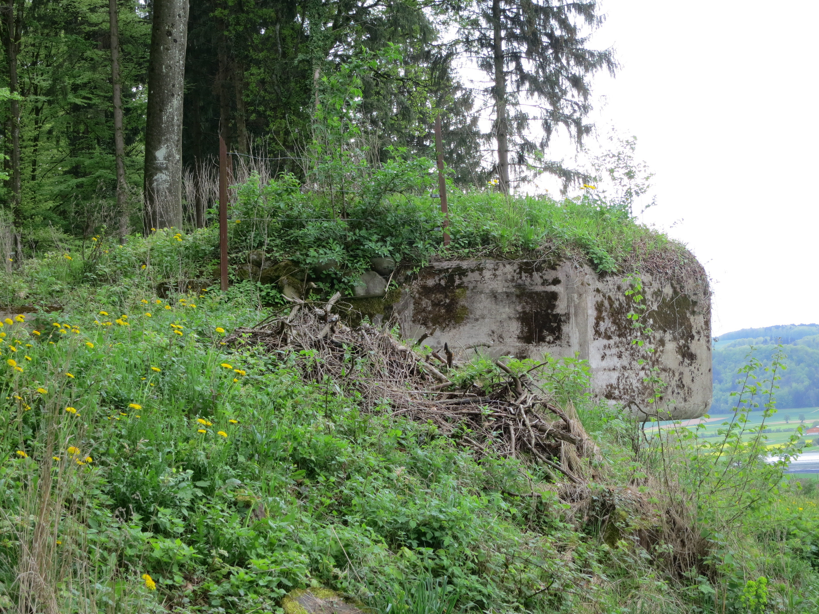 Bunker Rein AG, Schweiz: Art Beob A Hinter Rein A 3871